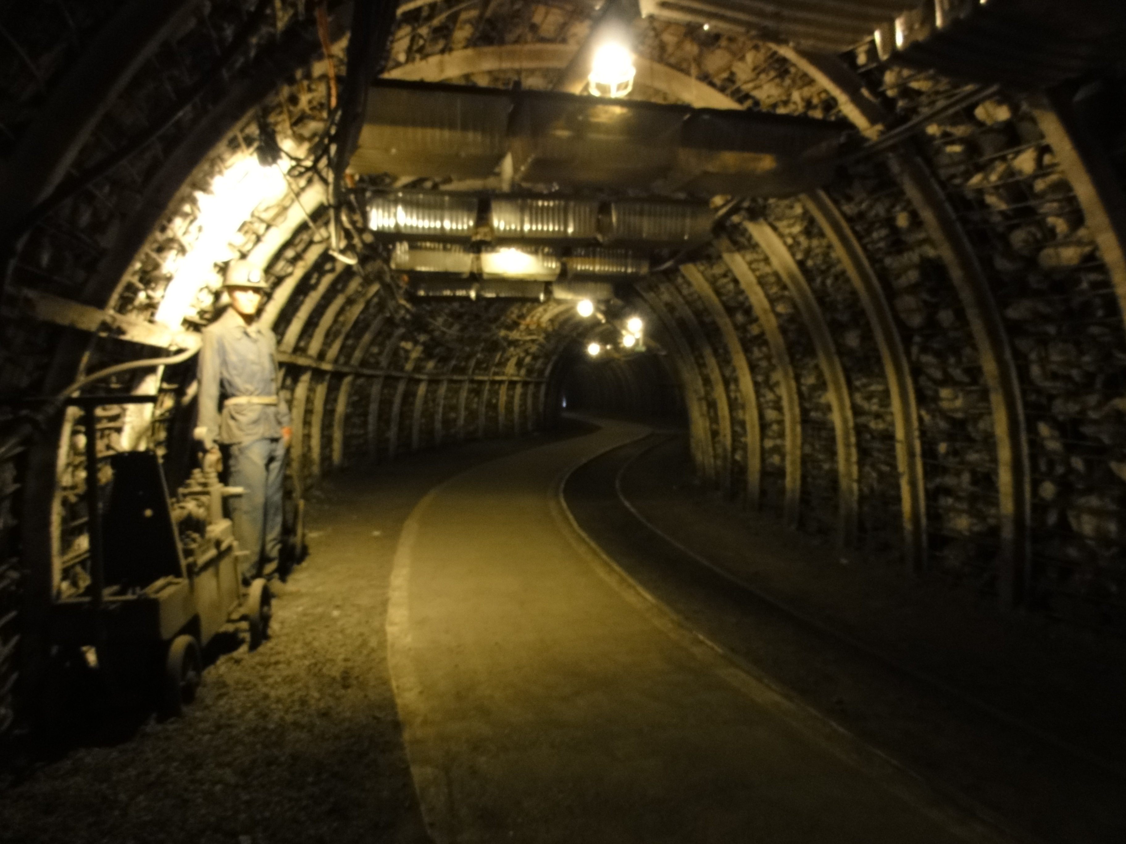 La Fosse Delloye de la Compagnie des mines d'Aniche était un charbonnage constitué de deux puits situé à Lewarde, Nord, Nord-Pas-de-Calais, France.Légende : néant.